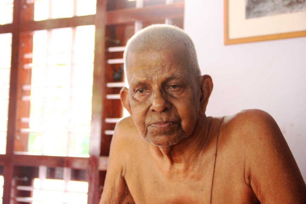 അക്കിത്തം അച്യുതൻ നമ്പൂതിരി